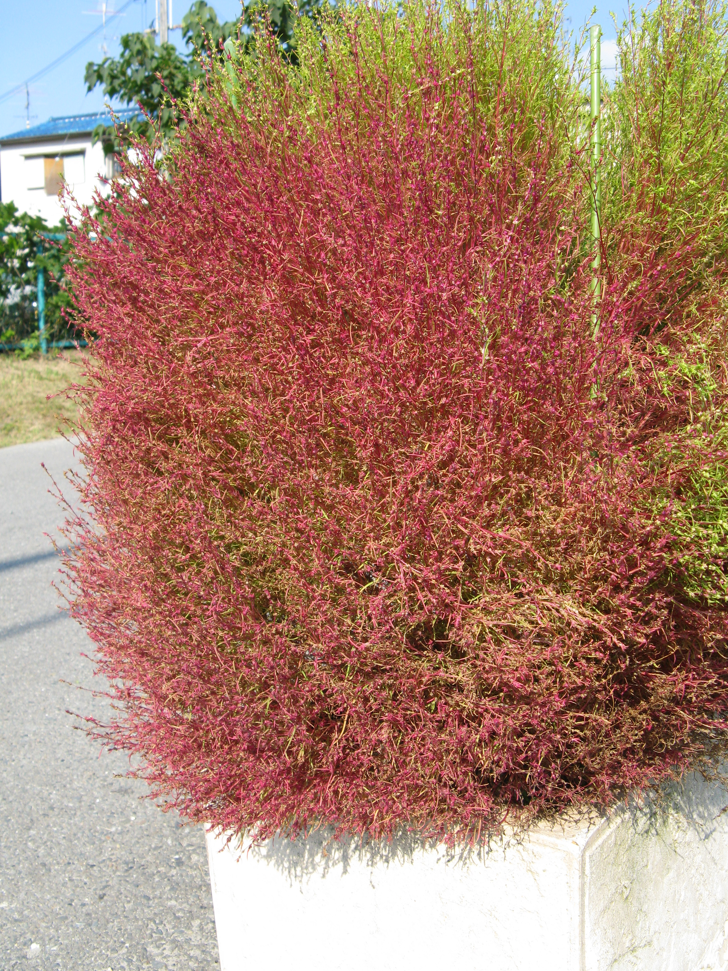 Scientific name Bassia scoparia (Syn. Kochia scoparia)